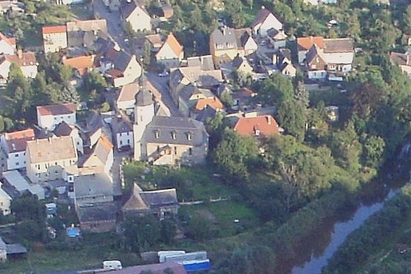 Luftbild Dorndorf an der Saale, Ortsmitte, Peterskirche